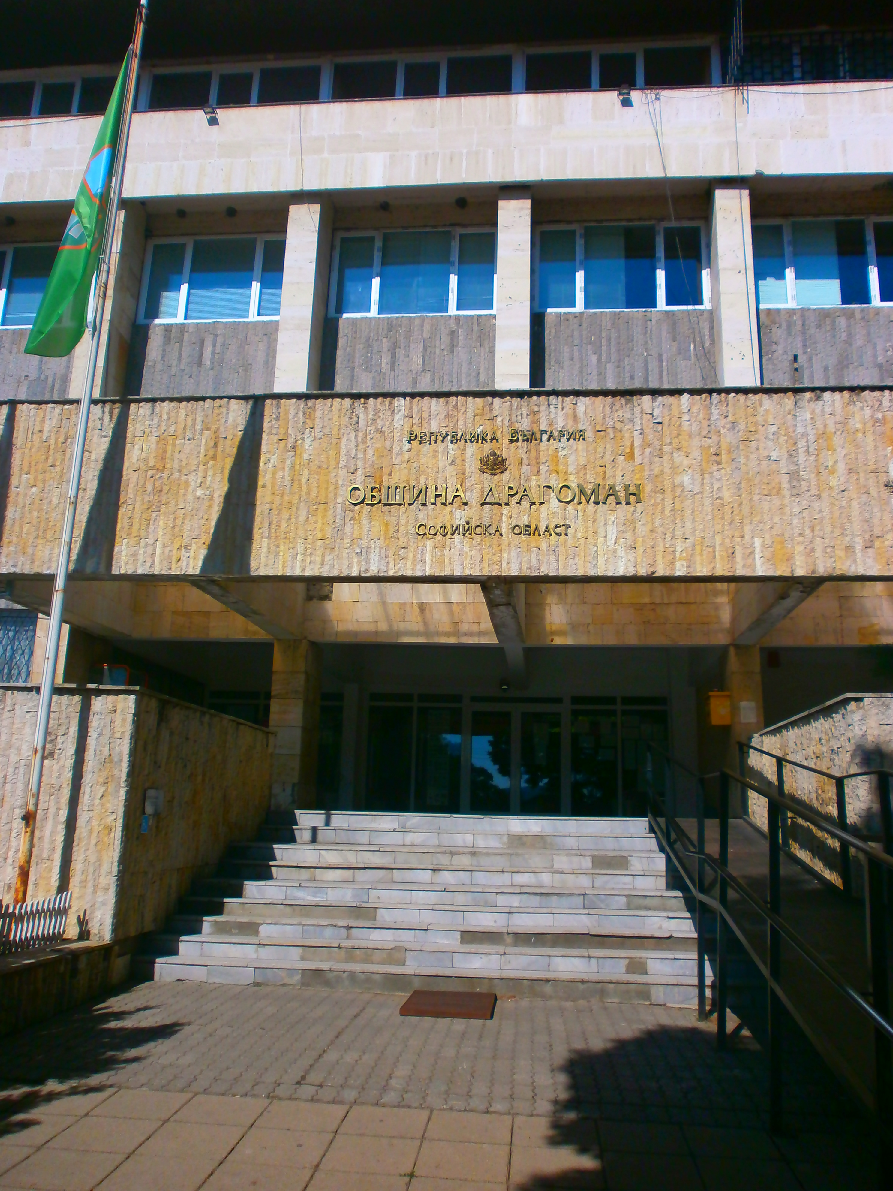 Srpski (latinica): Opština Dragoman